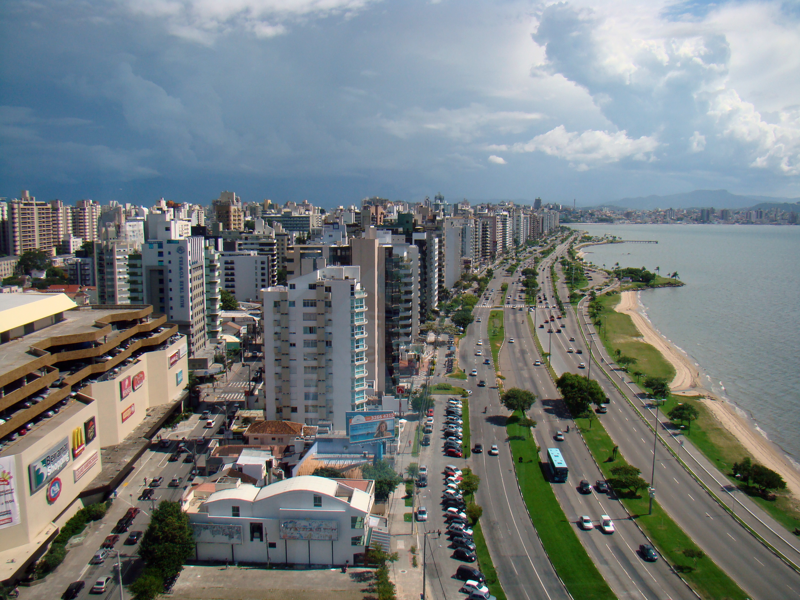 A Avenida Beira Mar Norte é uma avenida de Florianópolis. Localiza-se na região central da cidade, no bairro Centro, entre a parte inferior da Ponte Hercílio Luz e o viaduto de acesso ao Norte da Ilha.